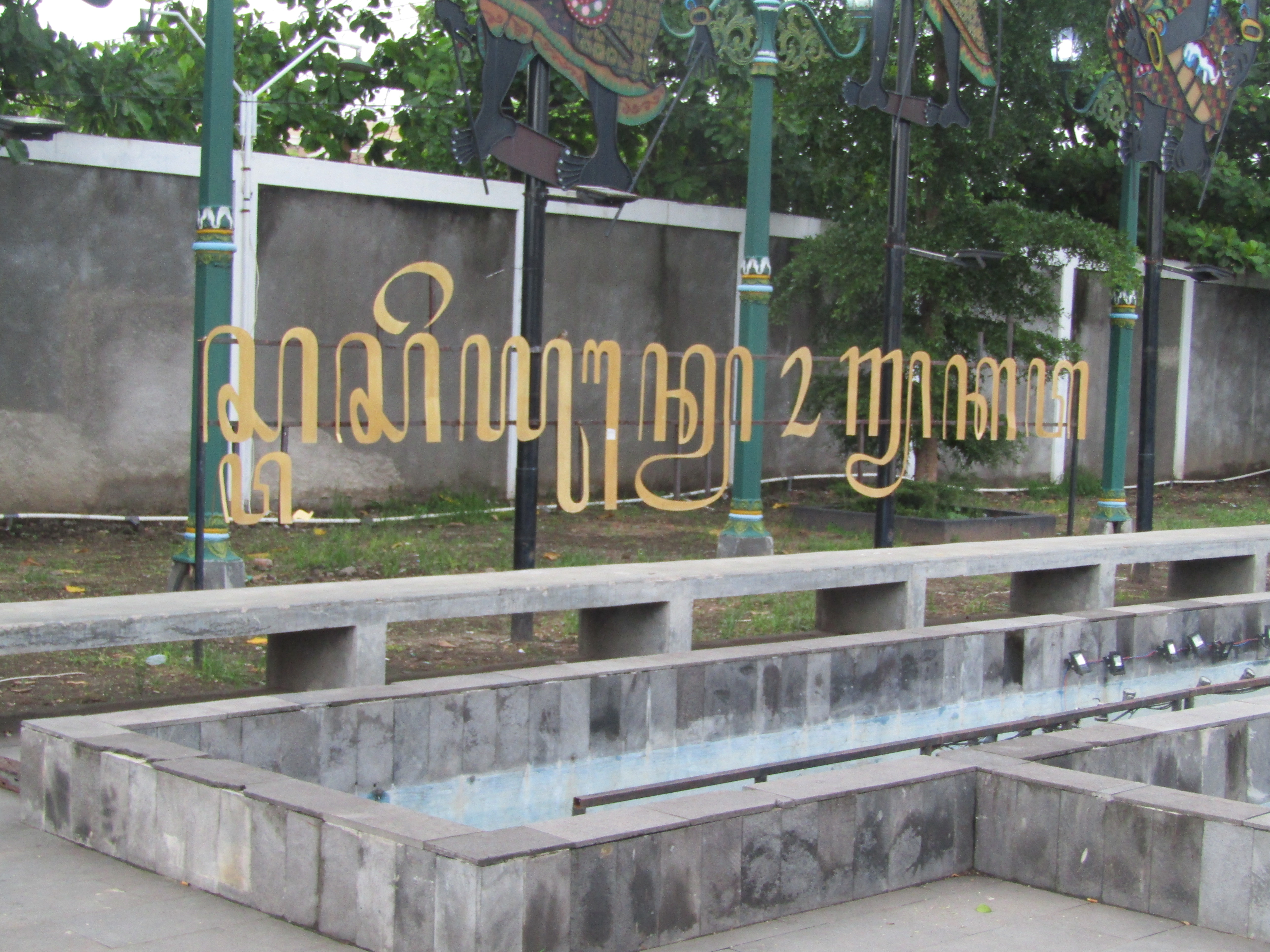 Aksara Jawa yang dipajang di depan Stasiun Tugu